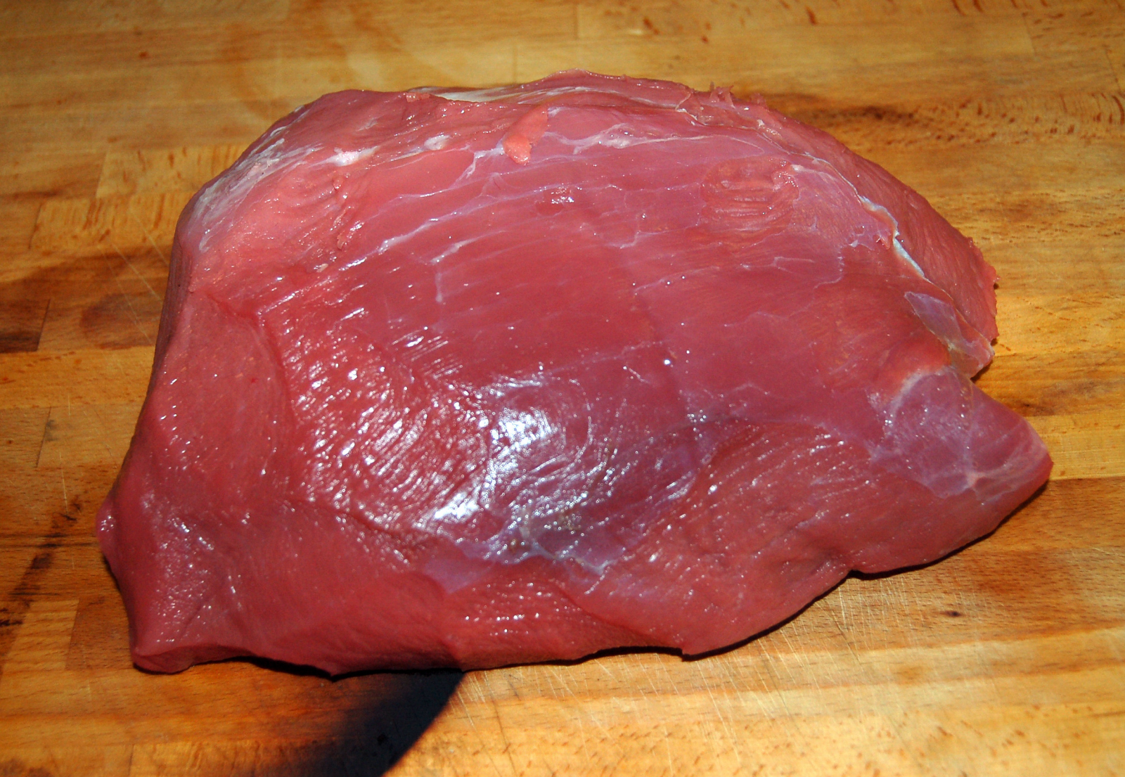 Foto eines Stück Kalbsnuss